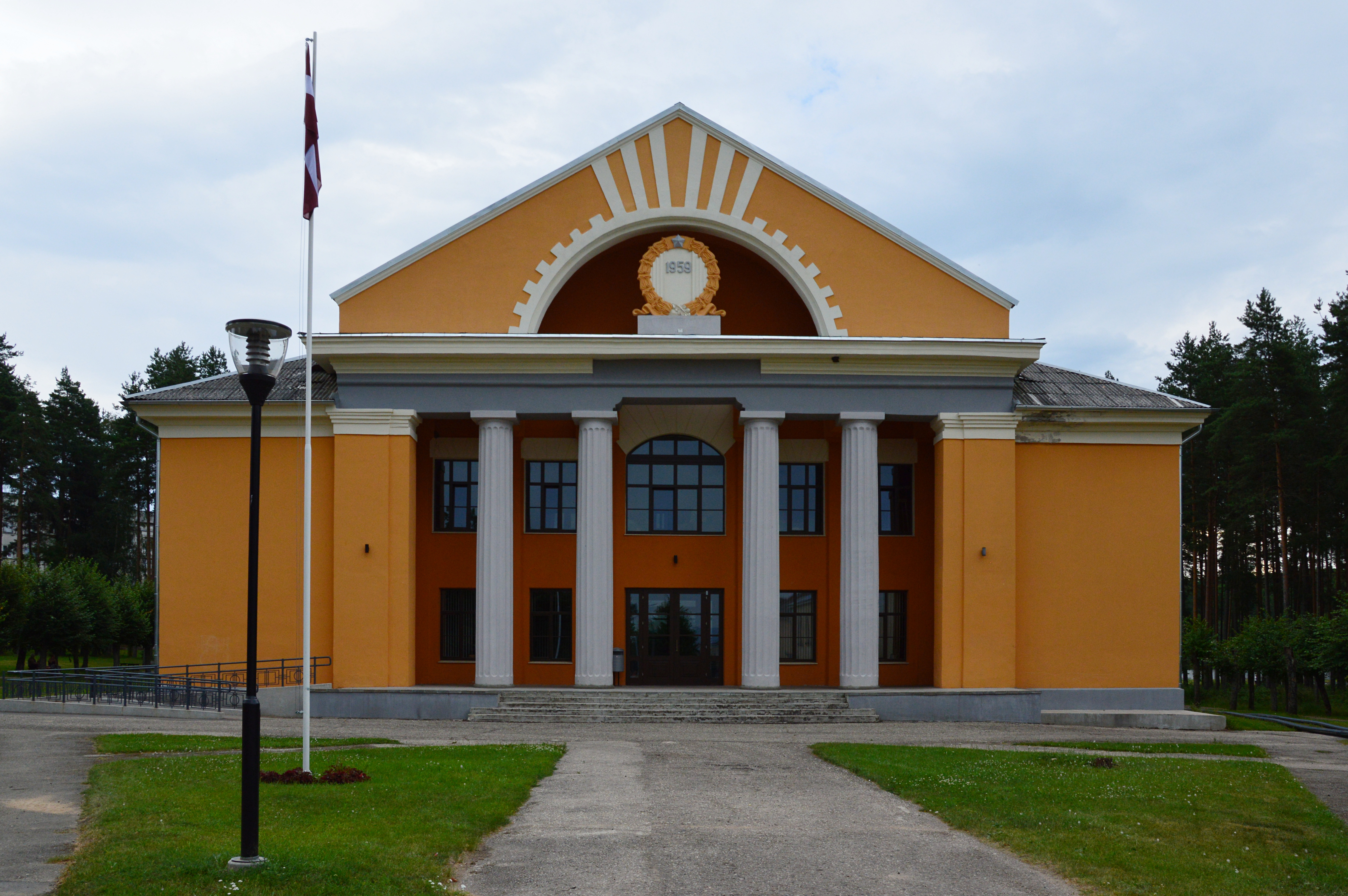 Seda linn Lätis. Kultuurimaja.